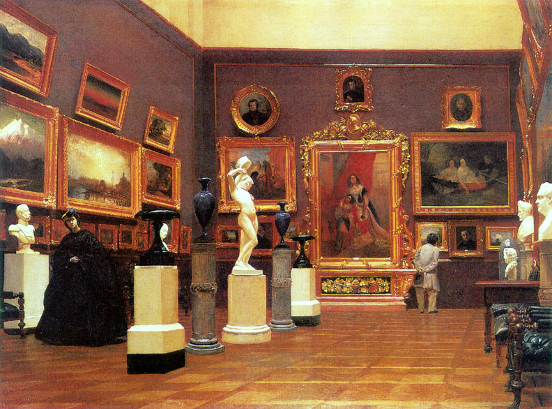 Интерьер картинной галереи В. А. Кокорева. 1864 год. Художник А. Гребнев. Холст, масло. 80х108. Донецкий областной художественный музей. После пожара 1812 года В. А. Кокорев приобрёл в 1820-х годах участок в Трёхсвятительском переулке в Москве. Поначалу там была гостиница, которую он сдавал. Но затем в конце 1850-х годов (открытие состоялось 26 января 1862) — им была специально построена картинная галерея, названная Кокоревской (арх. И. Д. Черник)